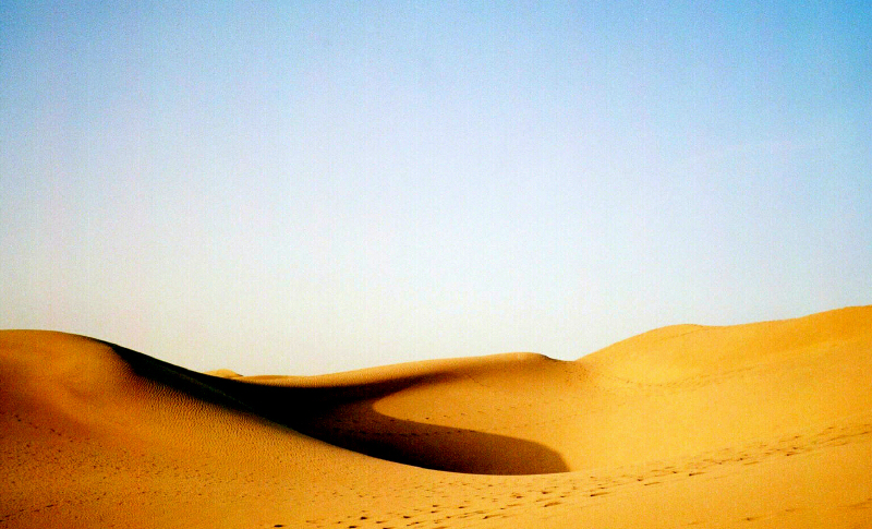 dunes at Maspalomas